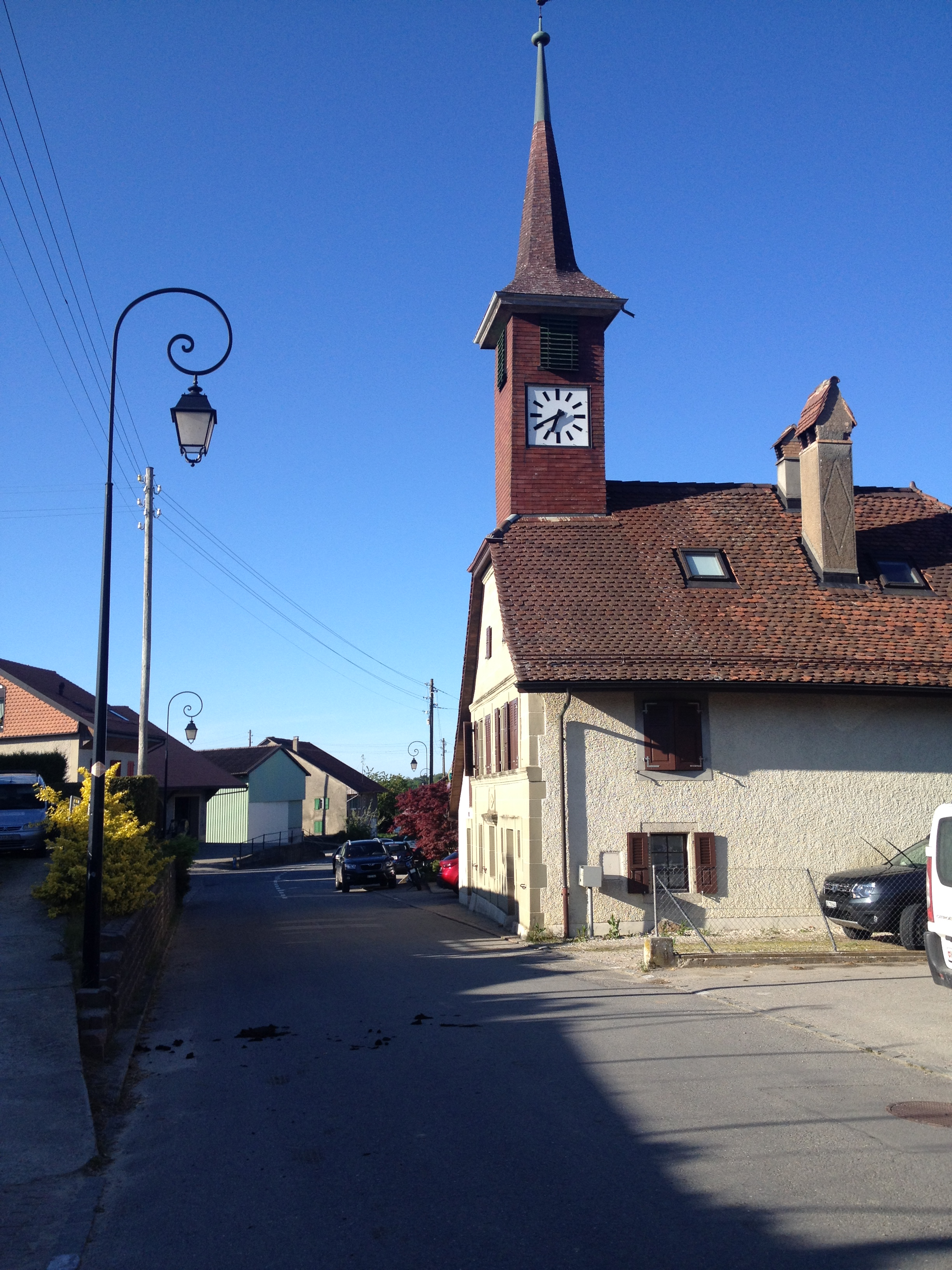 l'église de Boulens, dans le canton de Vaud en Suisse.